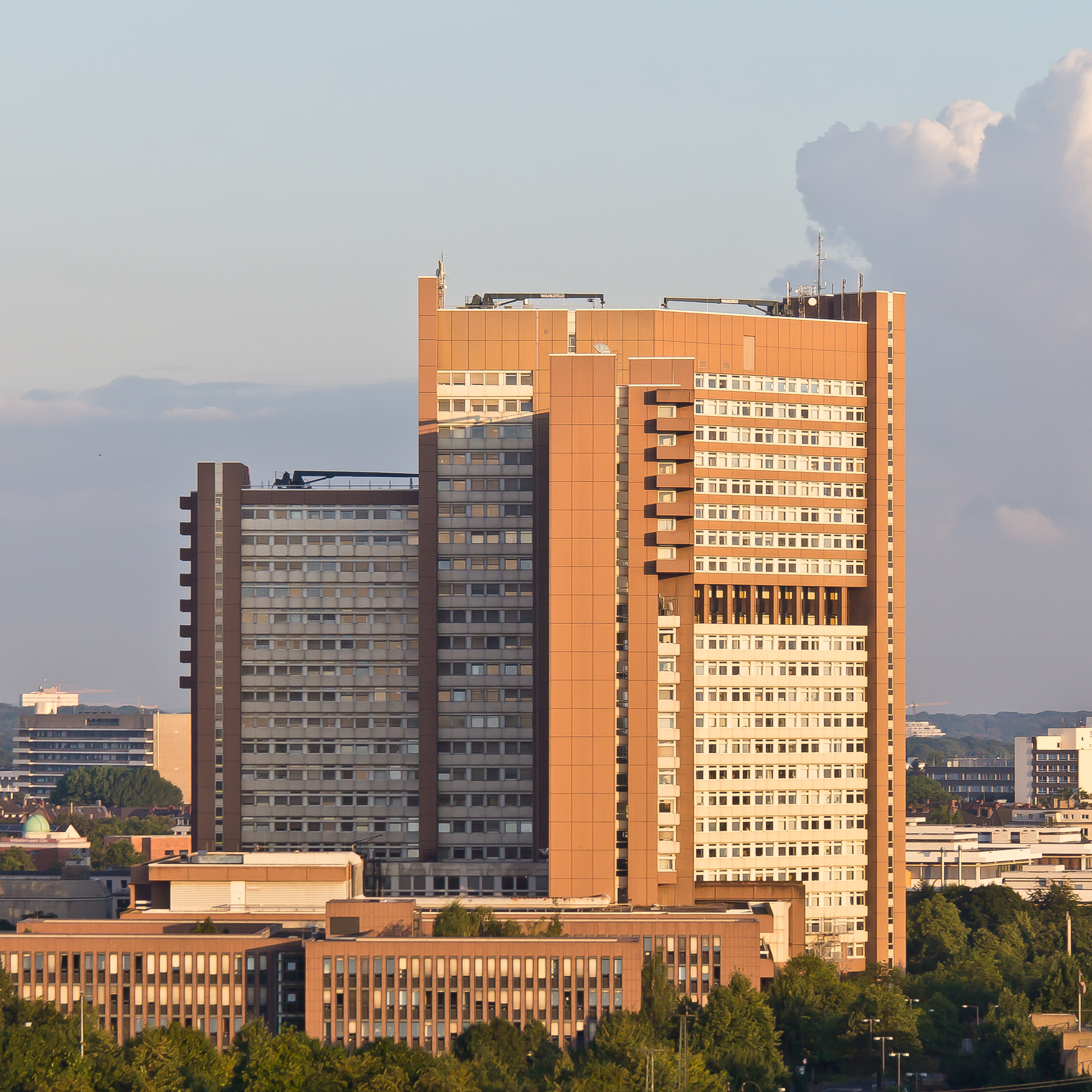 Ballonfahrt über Köln - Justizzentrum